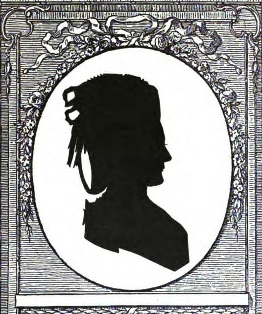 Елизавета Дмитриевна Кушелева, ур. Ланская (ум. 1822)